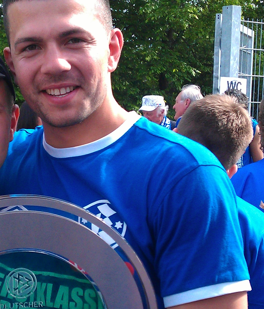 Simon Köpf 2012 beim Aufstieg der Stuttgarter Kickers